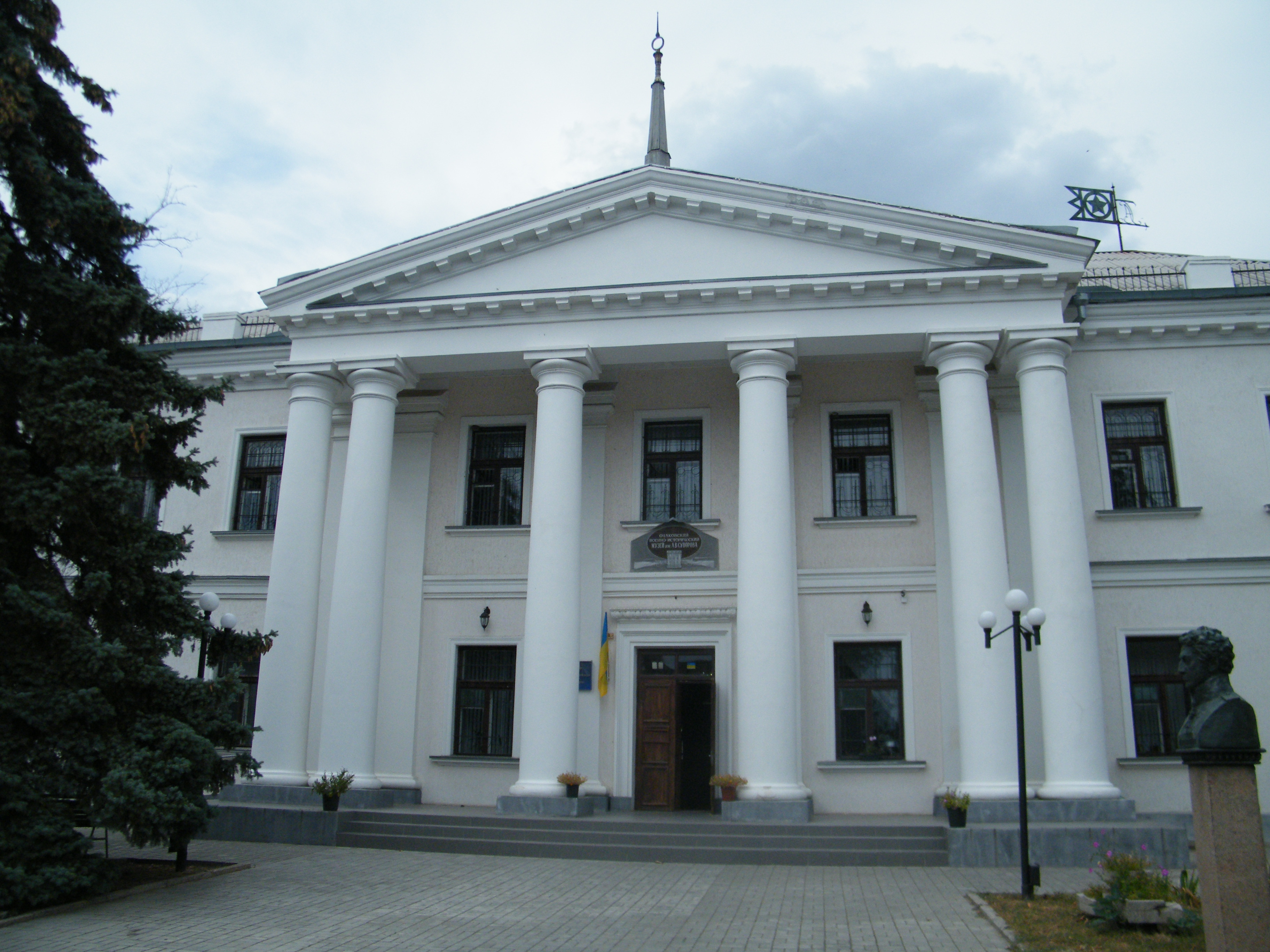 Очаківський військово-історичний музей імені О. В. Суворова